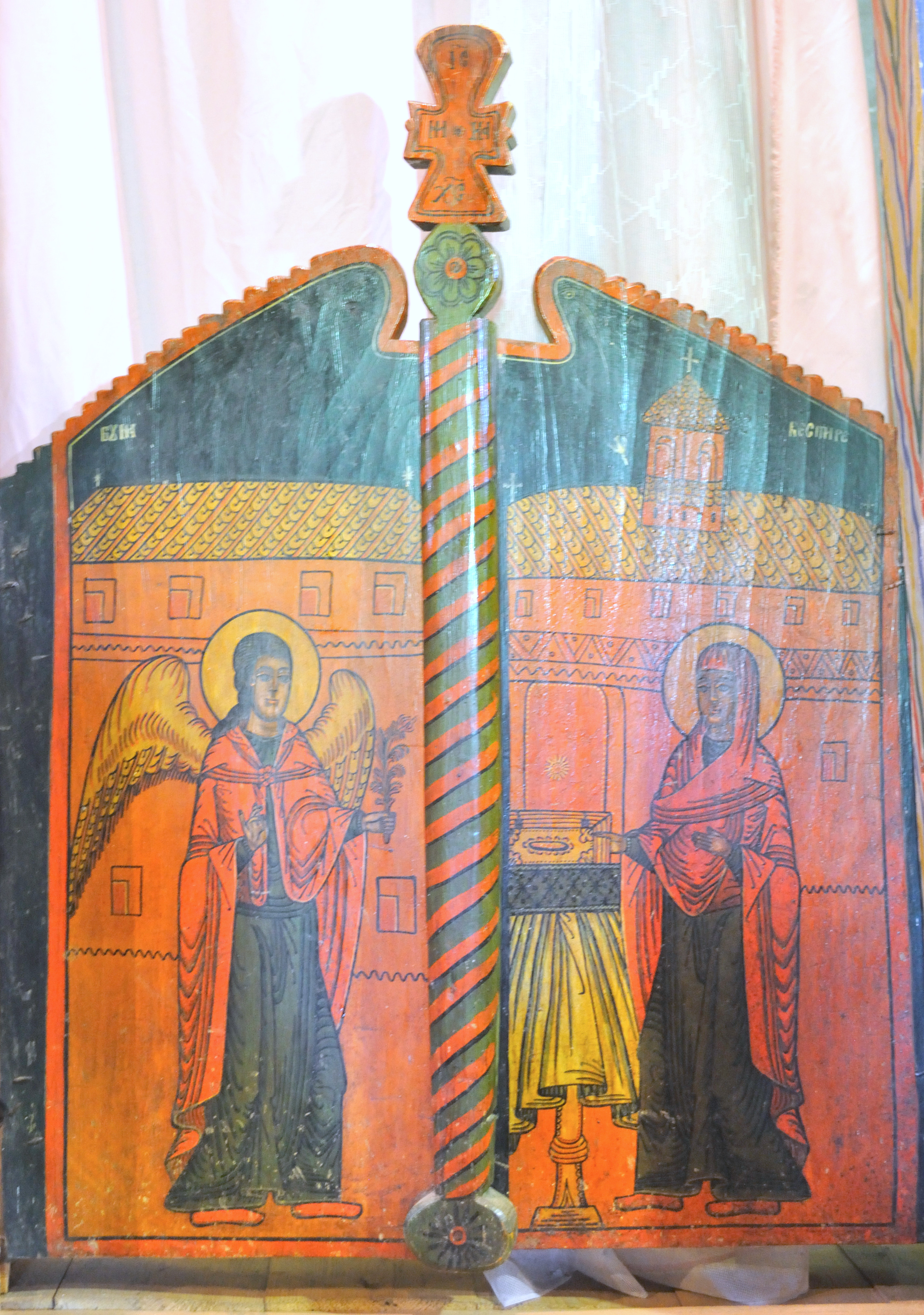 Biserica de lemn „Sfântul Gheorghe”, sat Turtaba, județ Mehedinți